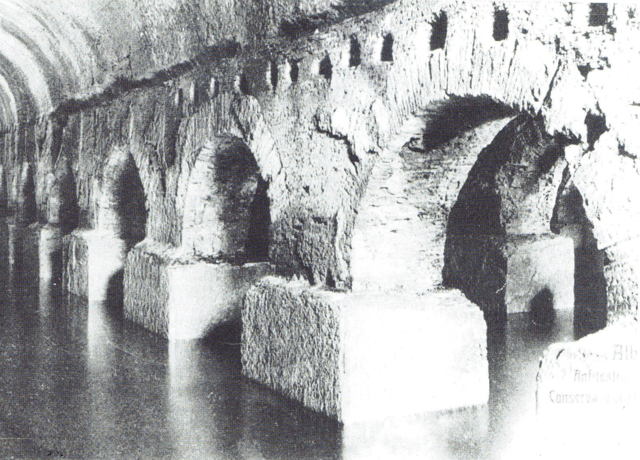 I Cisternoni di Albano Laziale (RM) prima del 1912